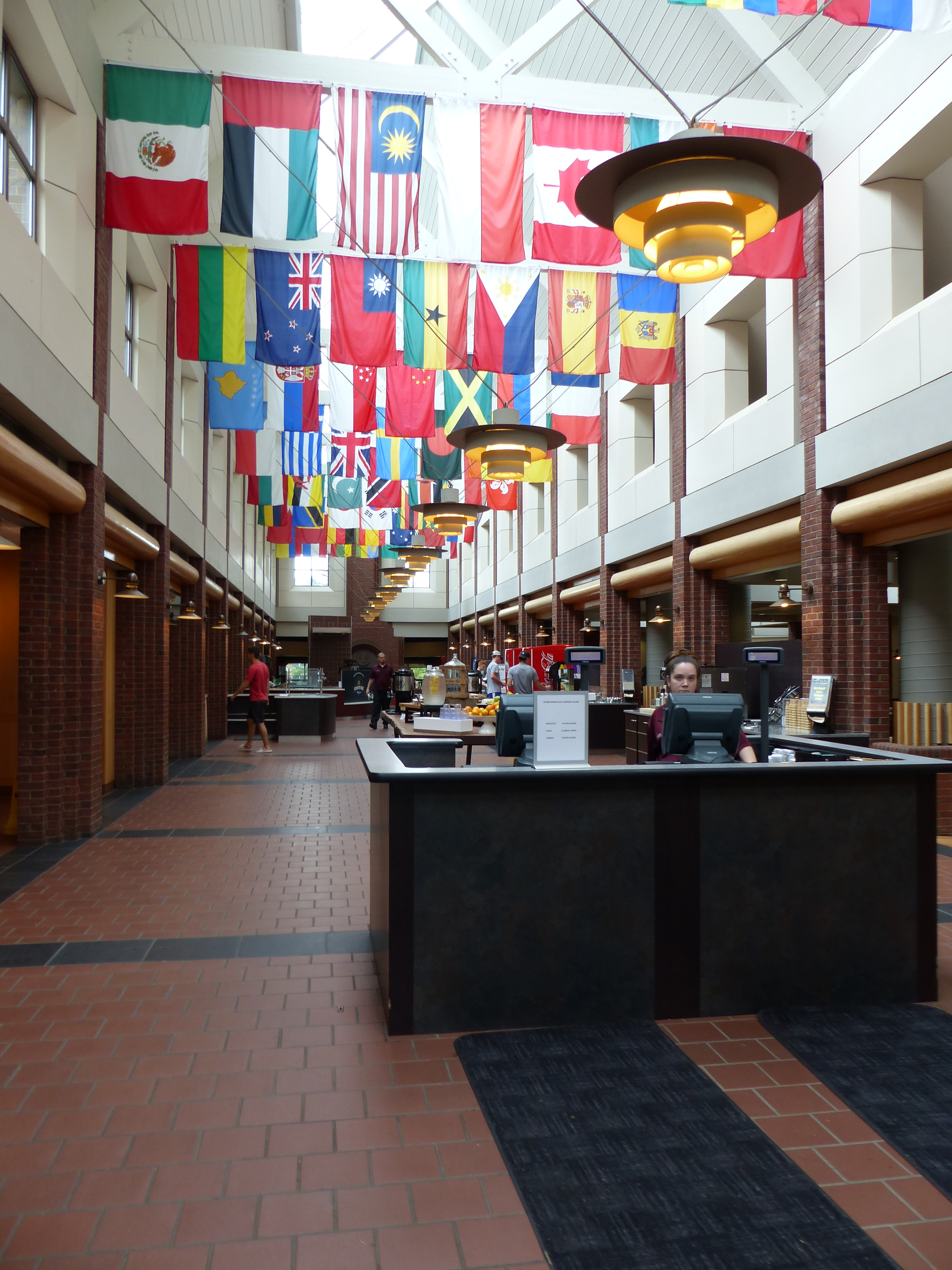 in der Mensa